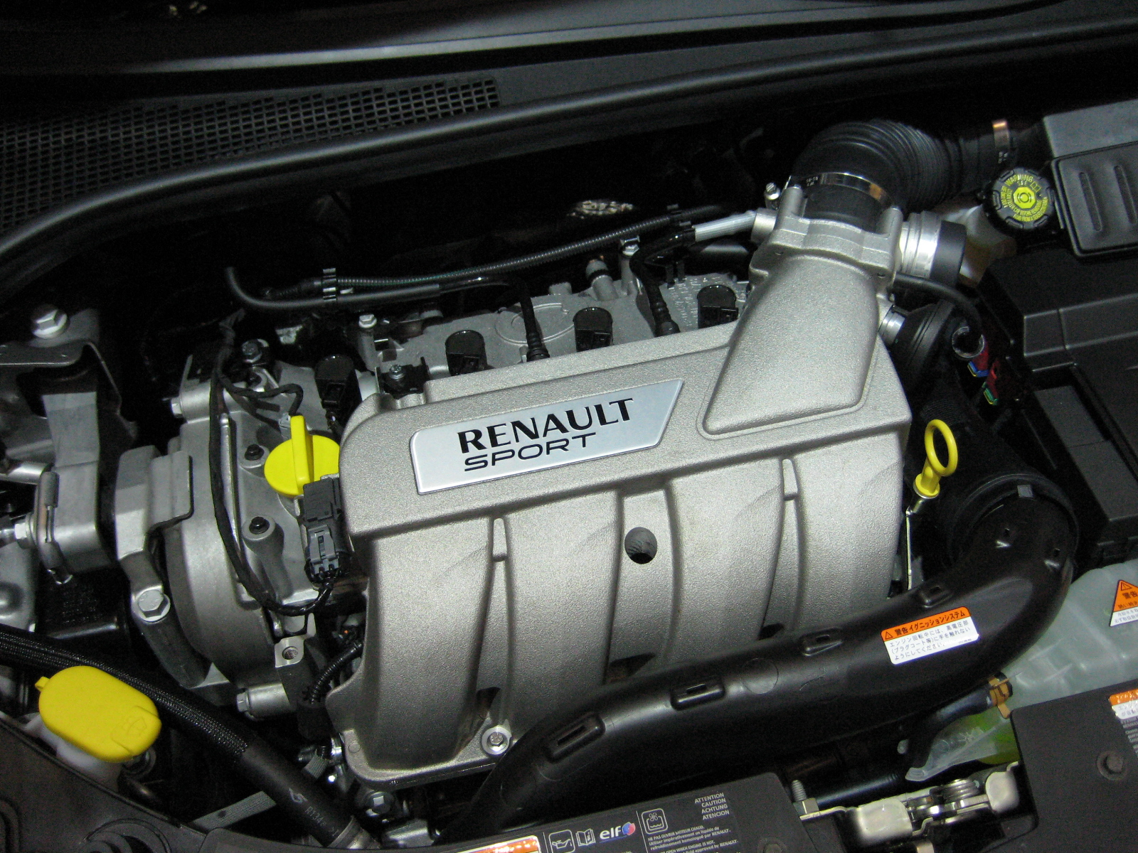 Renault Sport 2.0L F4R Engine on 2007 Clio Renault Sport